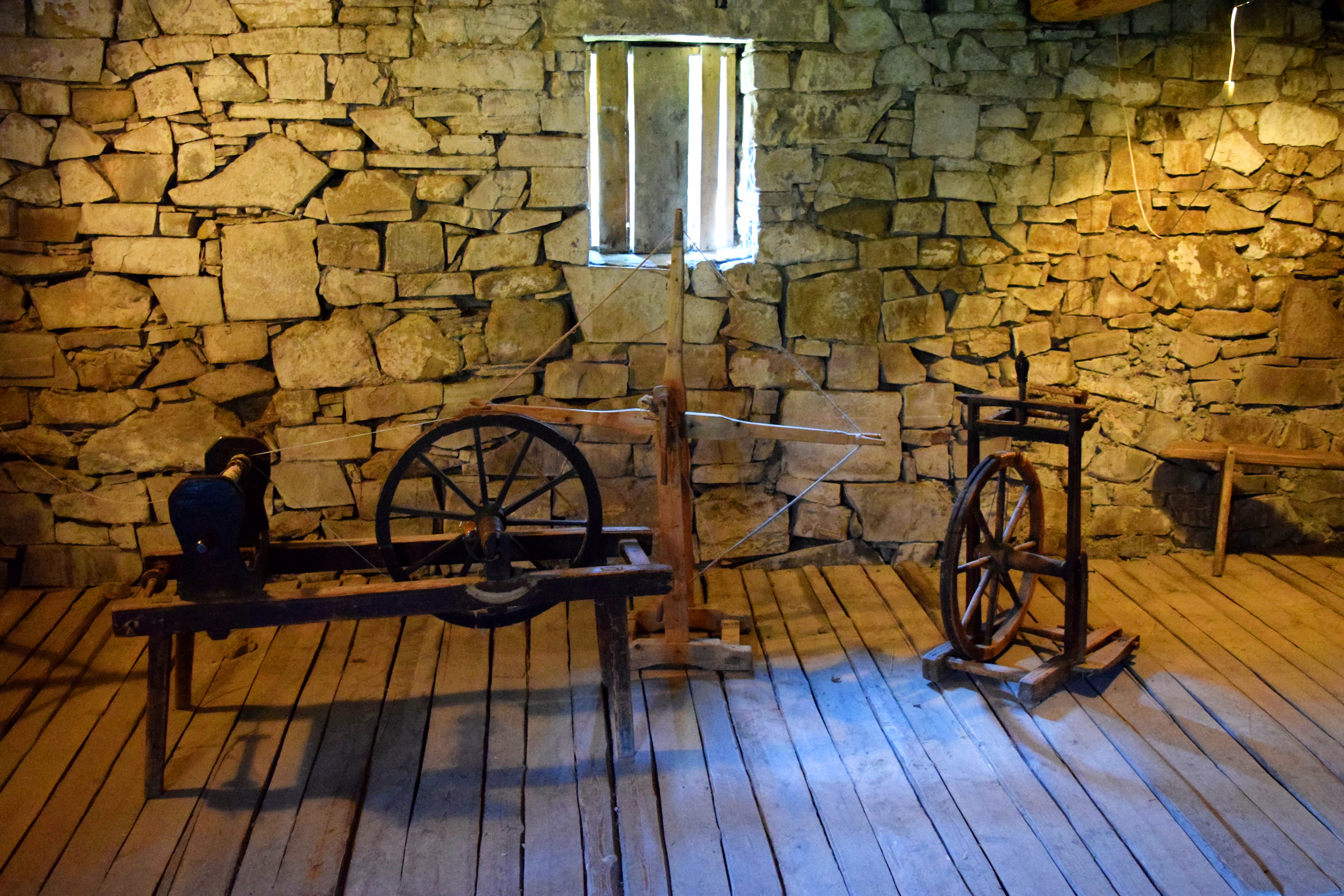 The Korkosz Croft in Czarna Góra